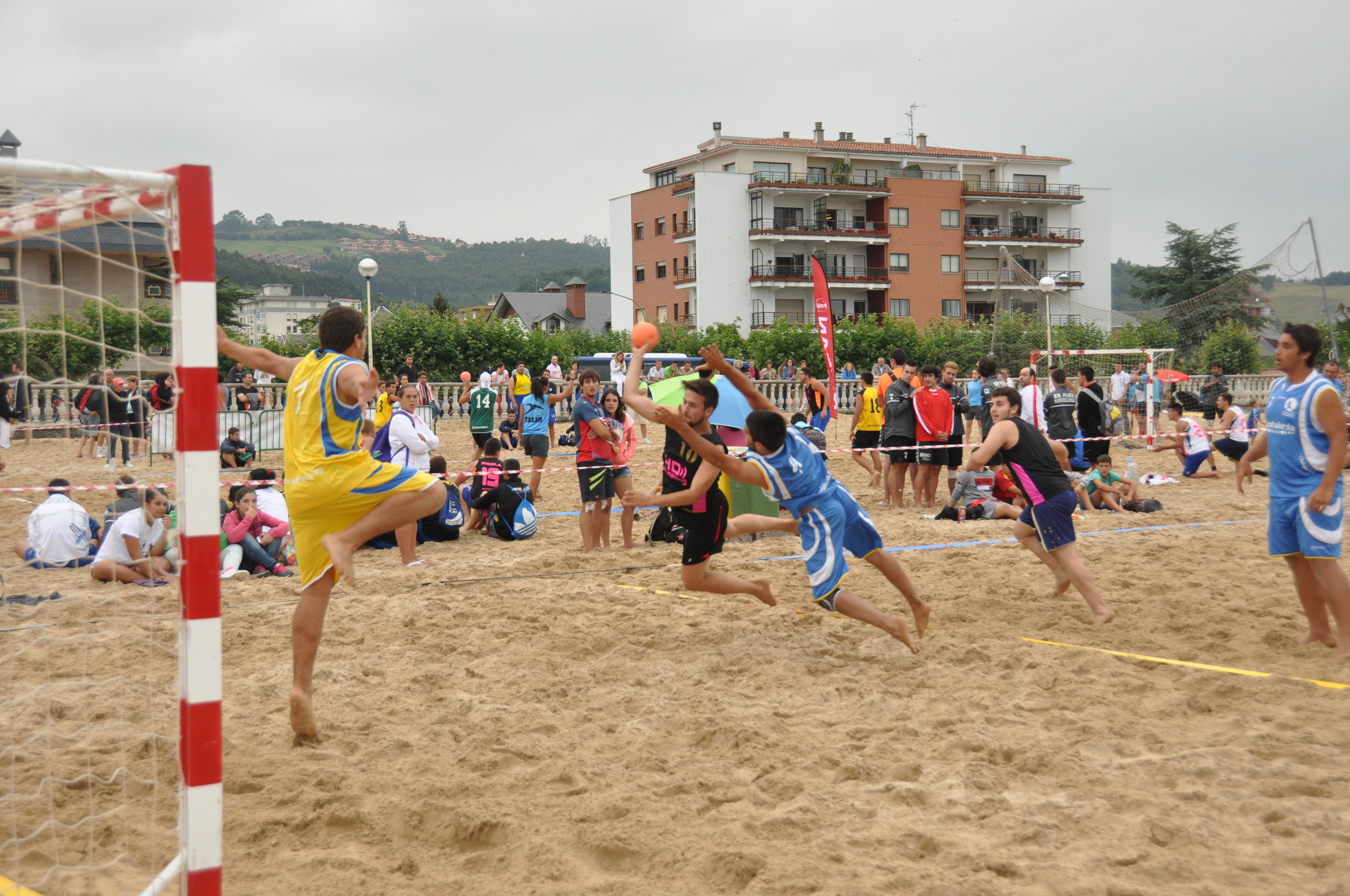 Imágenes del primer día de competición en el Campeonato de España de Balonmano Playa, que se celebra entre el 1 y el 3 de agosto en el municipio cántabro de Laredo.